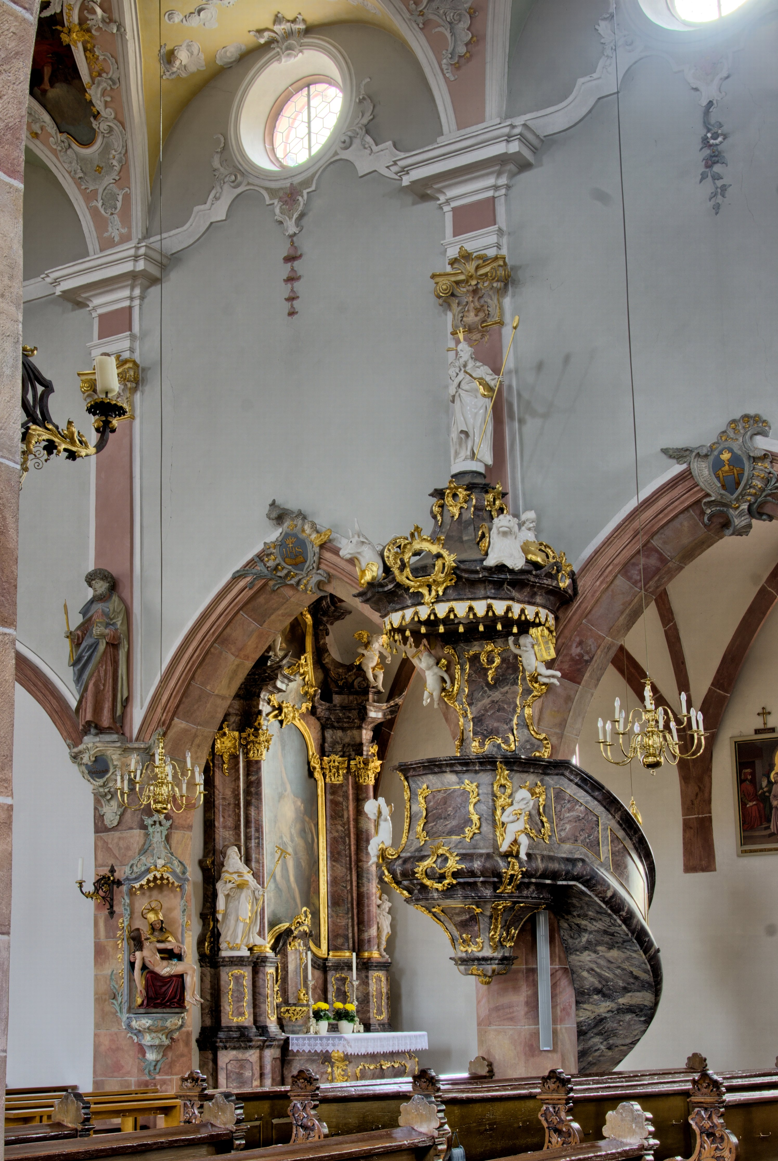 Bilder des Innenraums der Kirche St. Mariä Himmelfahrt in Kirchhofen, einem Teil der Gemeinde von Ehrenkirchen.